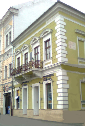 Bolyai János kolozsvári szülőháza